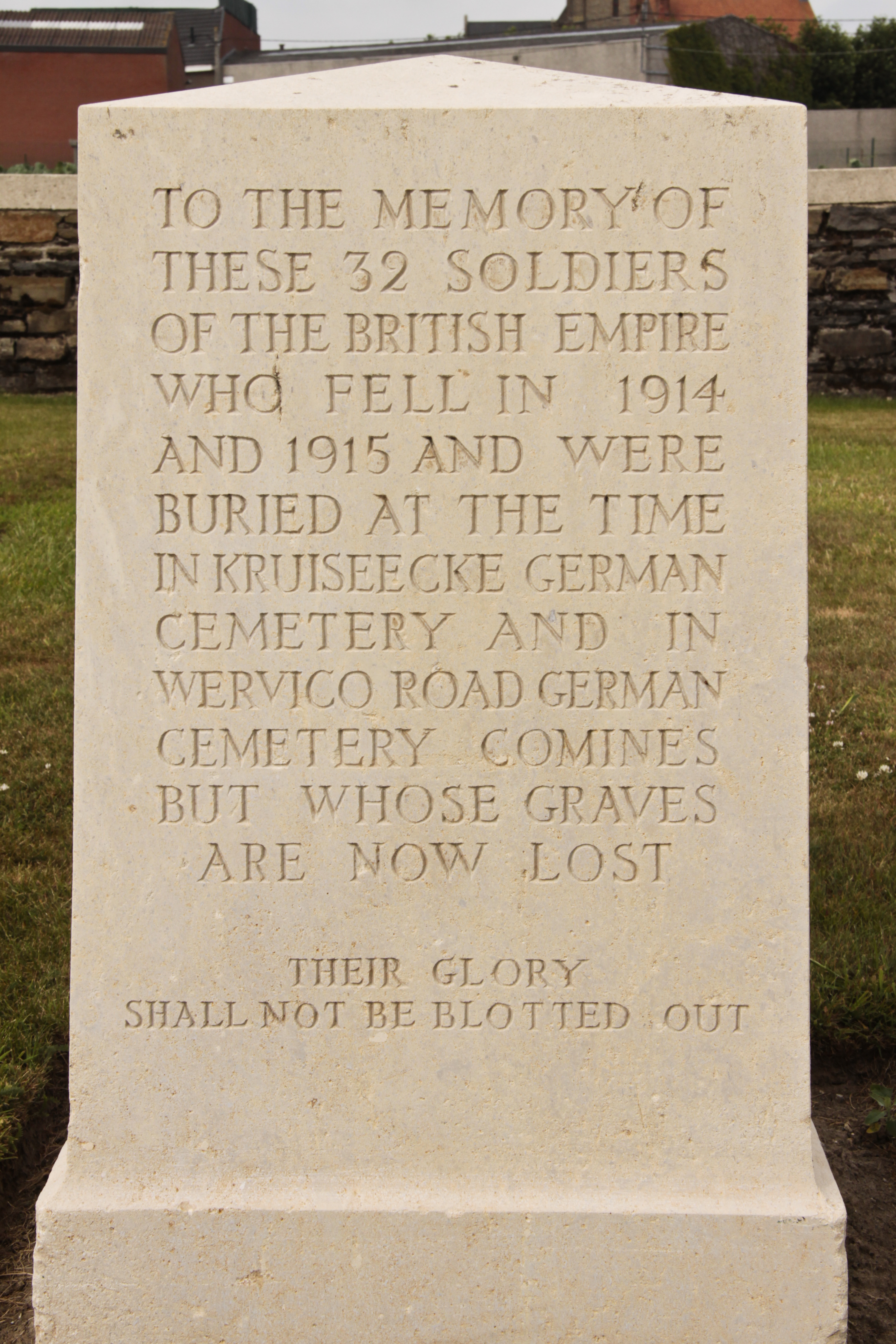 Zantvoorde British Cemetery.